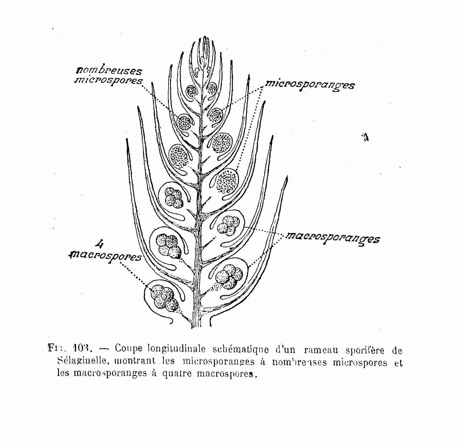 Sélaginelle - coupe en long de rameau sporifère